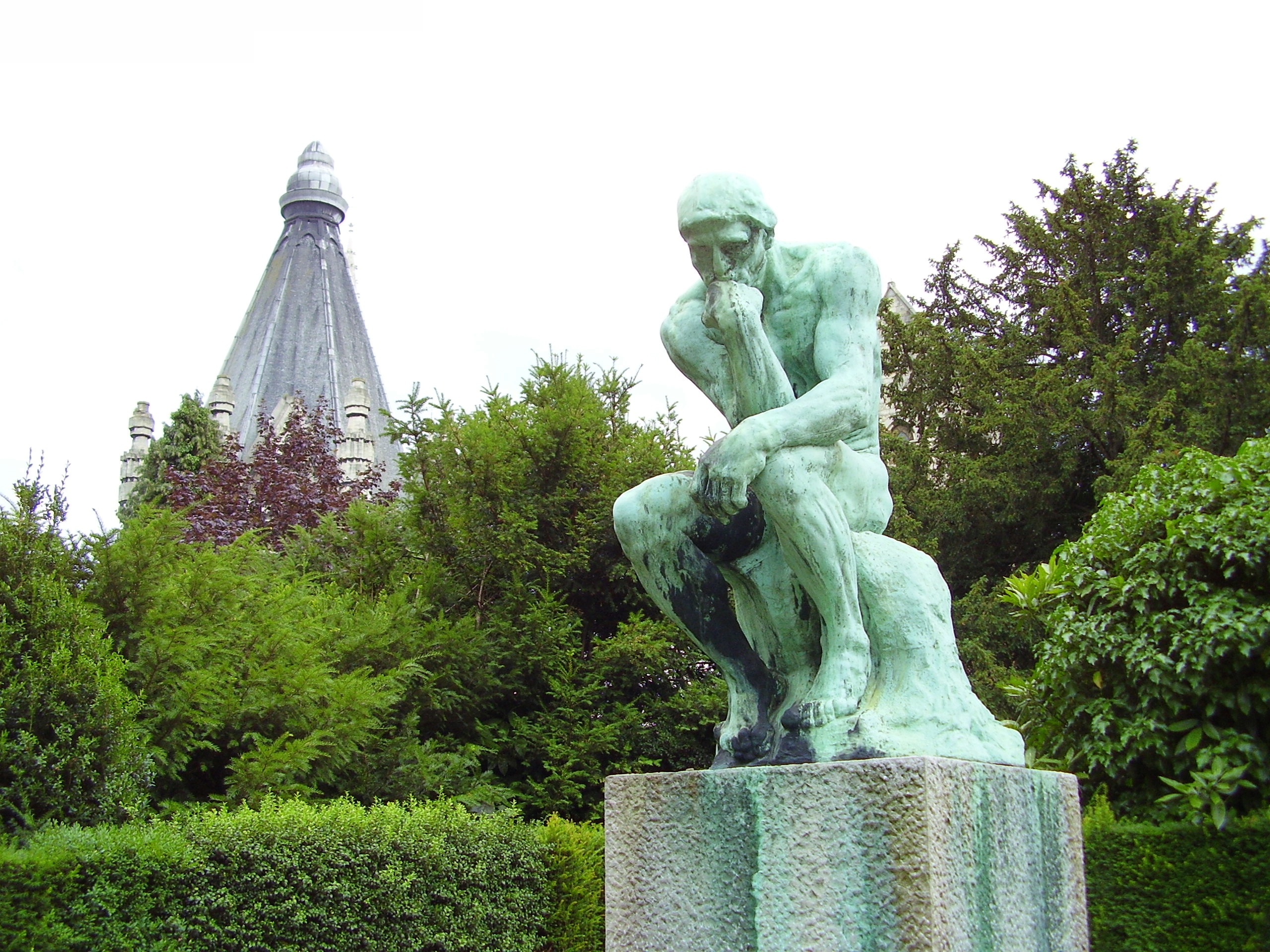 Description: Le Penseur, Auguste Rodin - Cimetière de Laeken (Bruxelles) Author: User:Ben2 Date of creation: 10 août 2006 Source: Photo personnelle